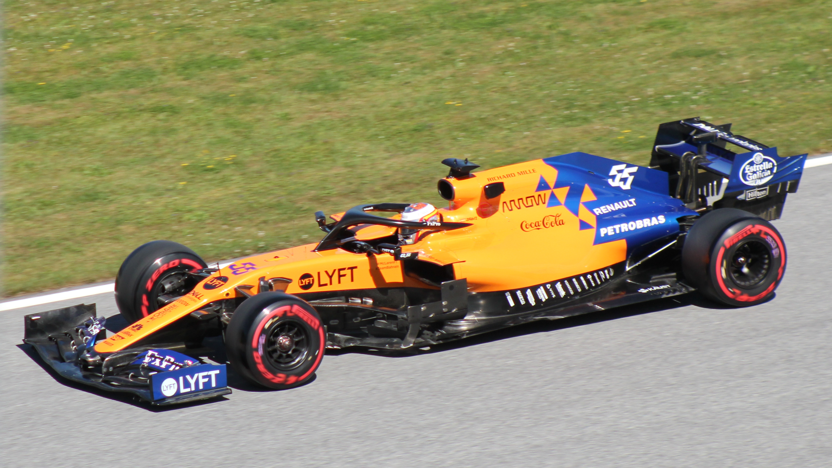 Sainz beim Rennwochenende in Österreich 2019